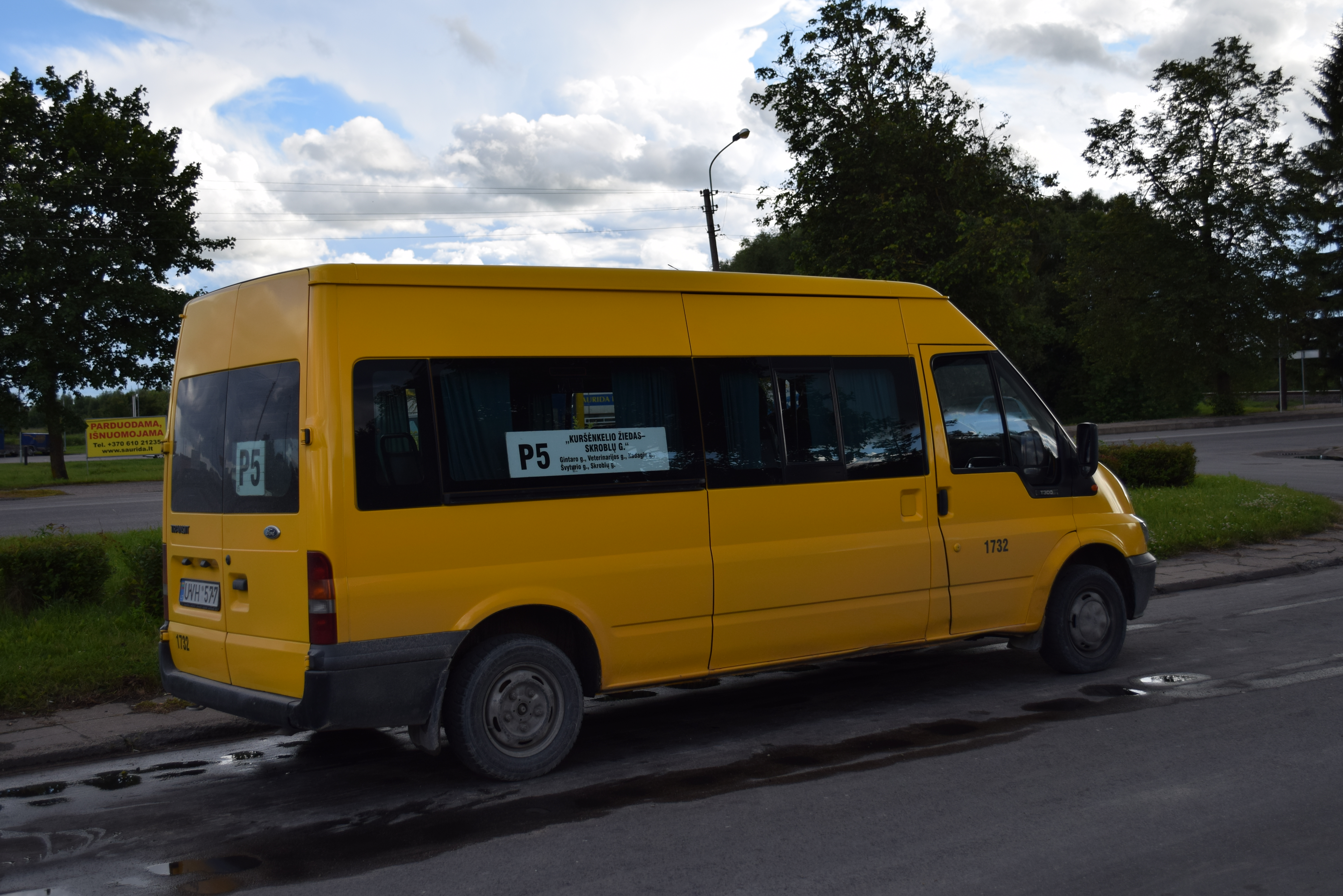 Privežamasis "Busturo" "Ford" mikroautobusas Kuršėnkelio žiede. Luko Aluzo nuotrauka. 2014 m. birželio 24 d.